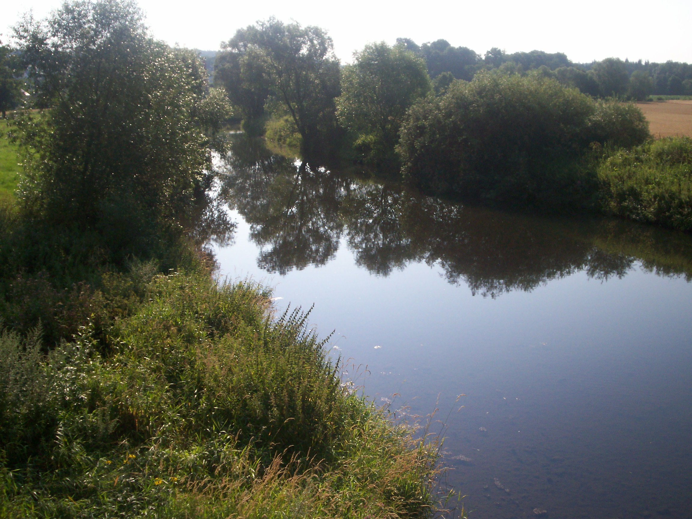 Lwówek Ślaski, rzeka Bóbr.